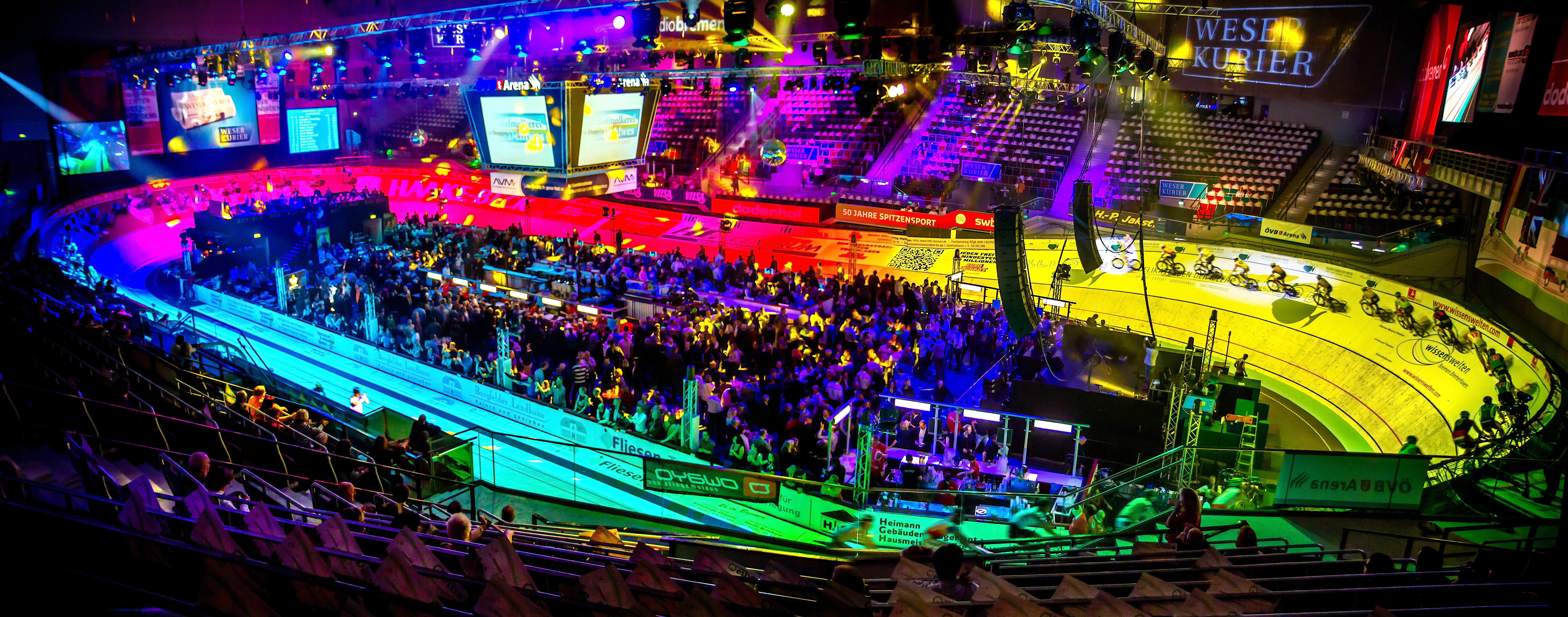 Innenraum der Bremer Stadthalle (ÖVB-Arena) in Bremen, Deutschland, beim Bremer Sechstagerennen 2014.